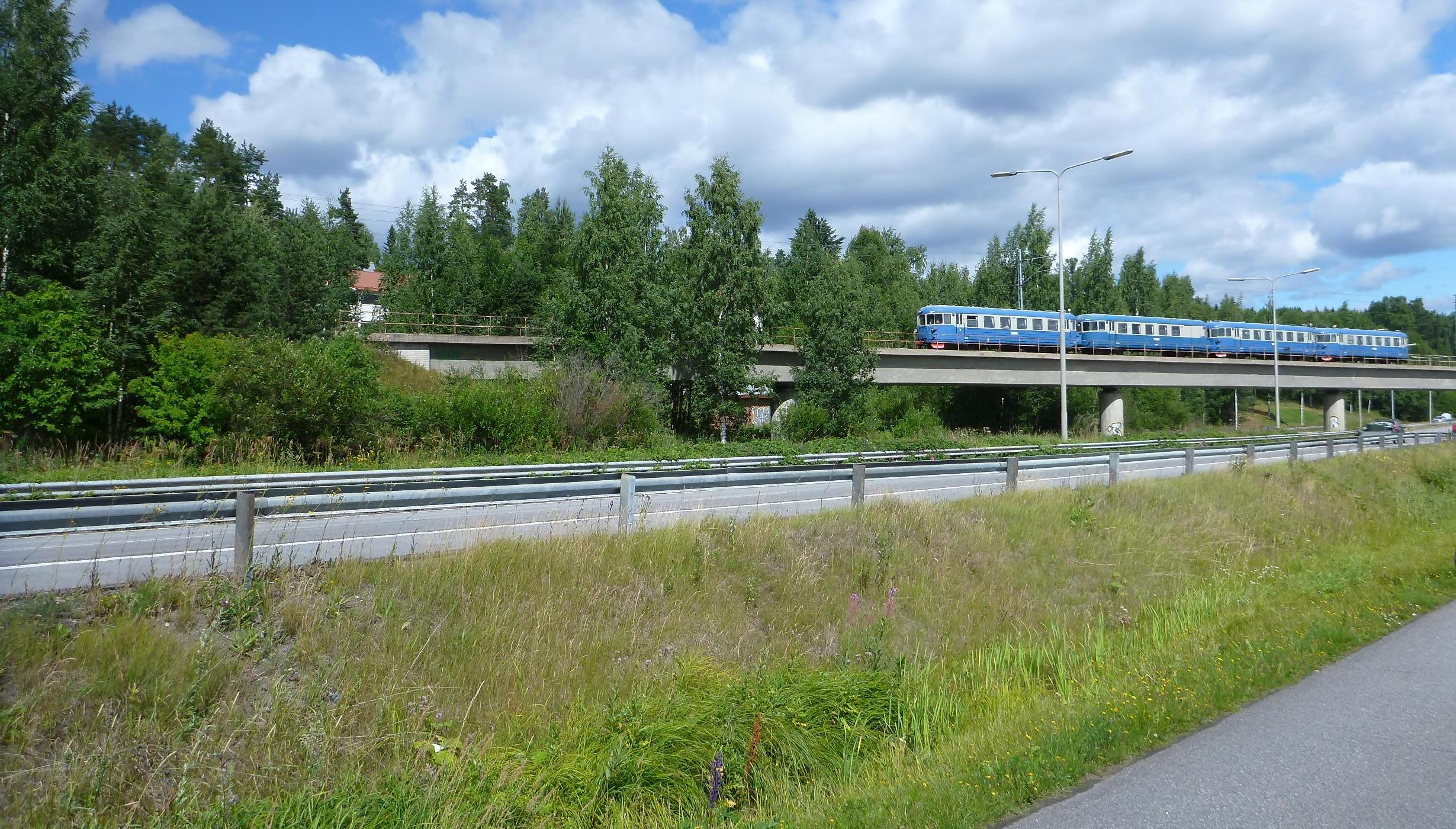 Dm7-juna Jyväskylässä heinäkuussa 2013